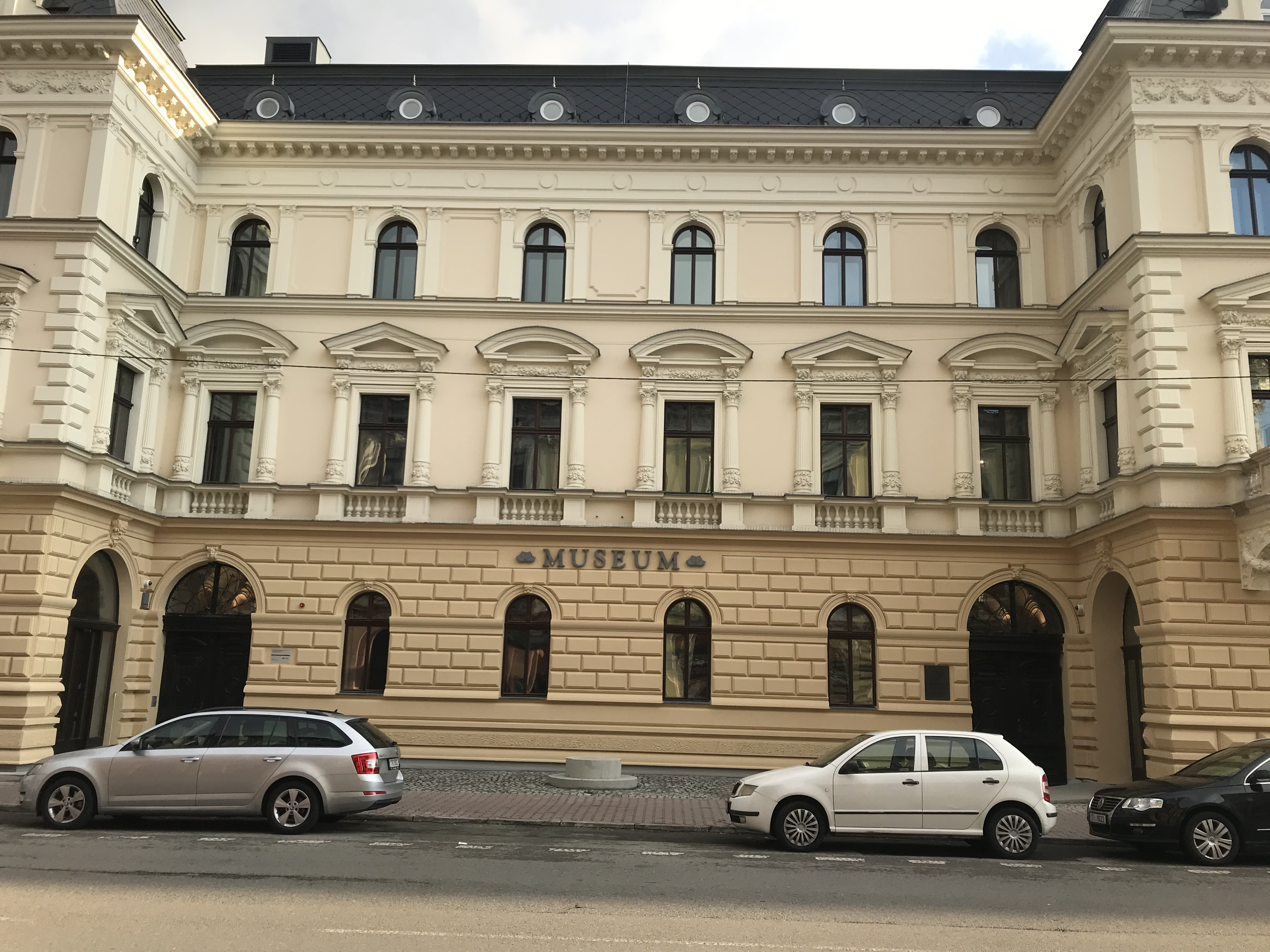 Těšínské muzeum po rekonstrukci